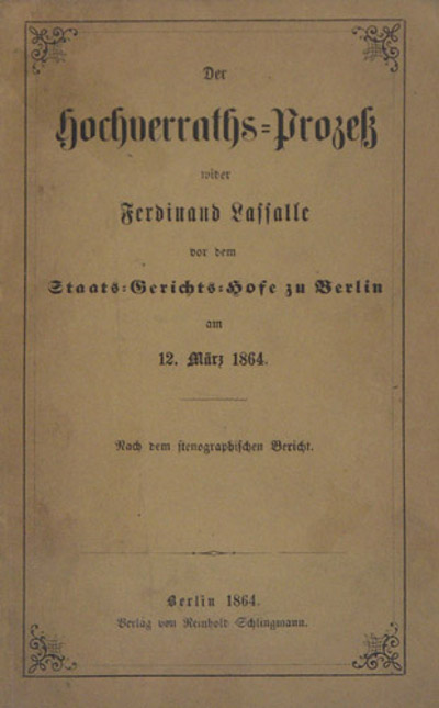 Der Hochverratsprozeß wider Ferdinand Lassalle , 1864